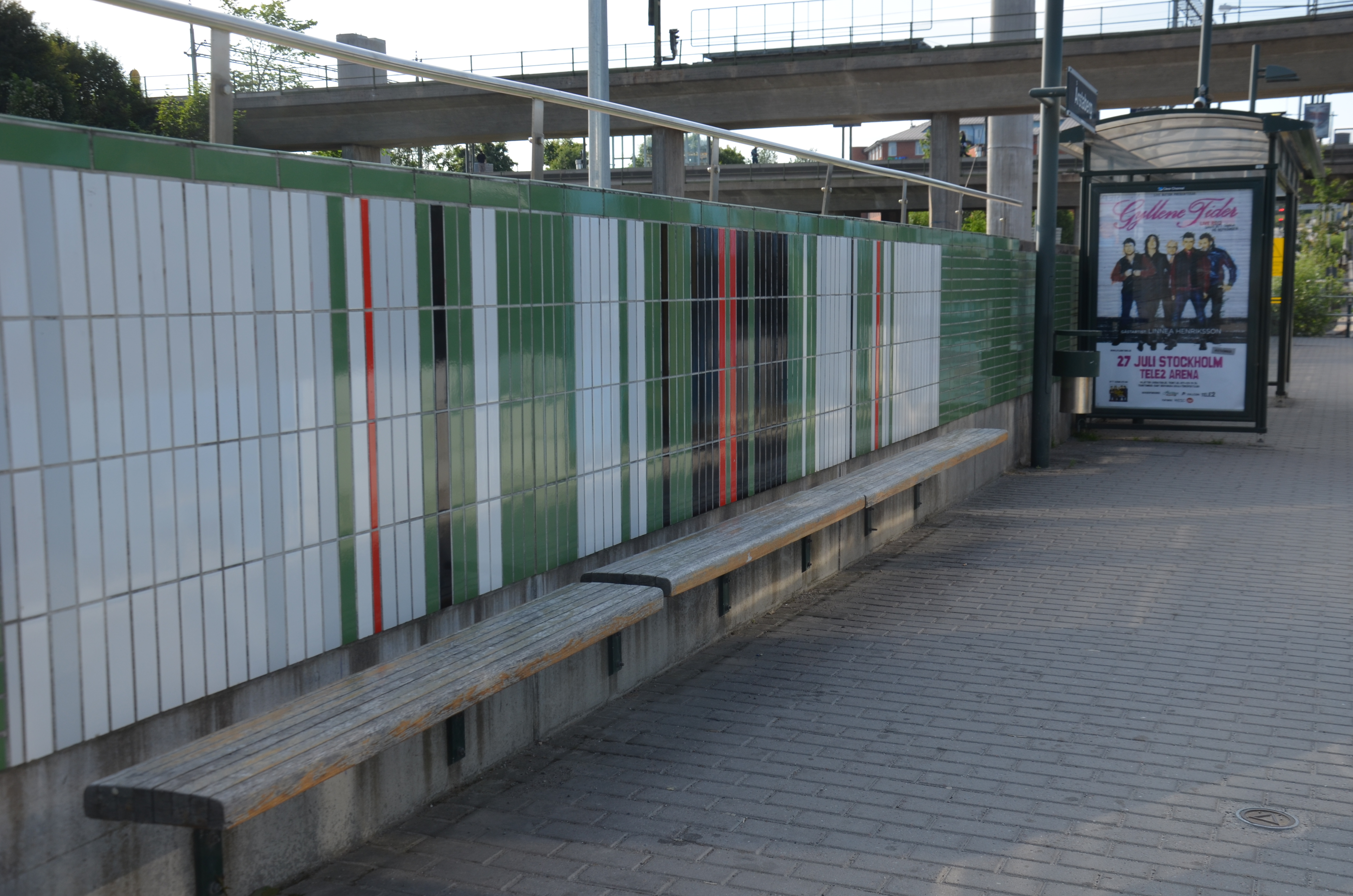 Nils Kölares utsmyckning av tvärbanestation Årstaberg i Stockholm